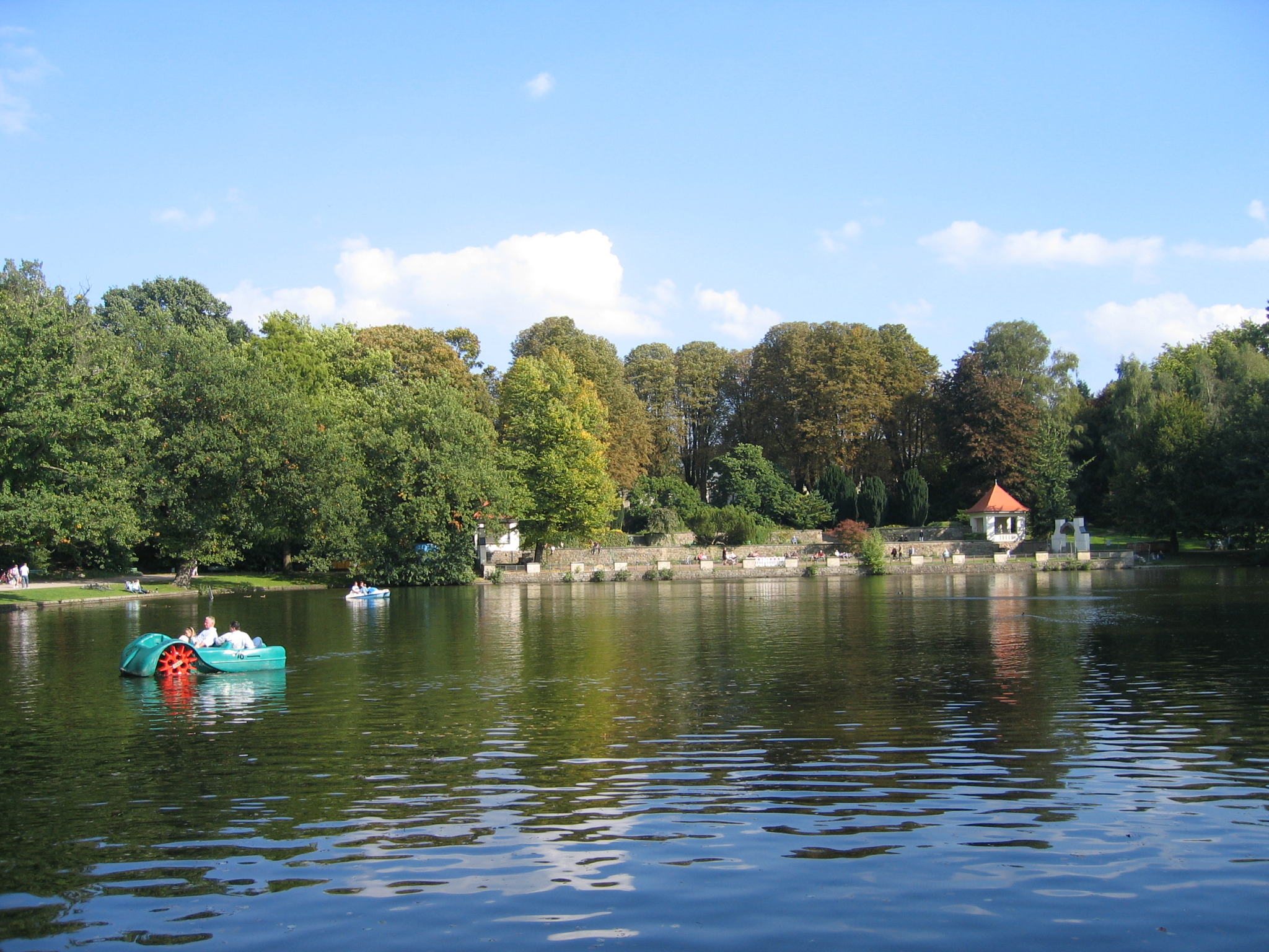 Hangeweiher in Aachen